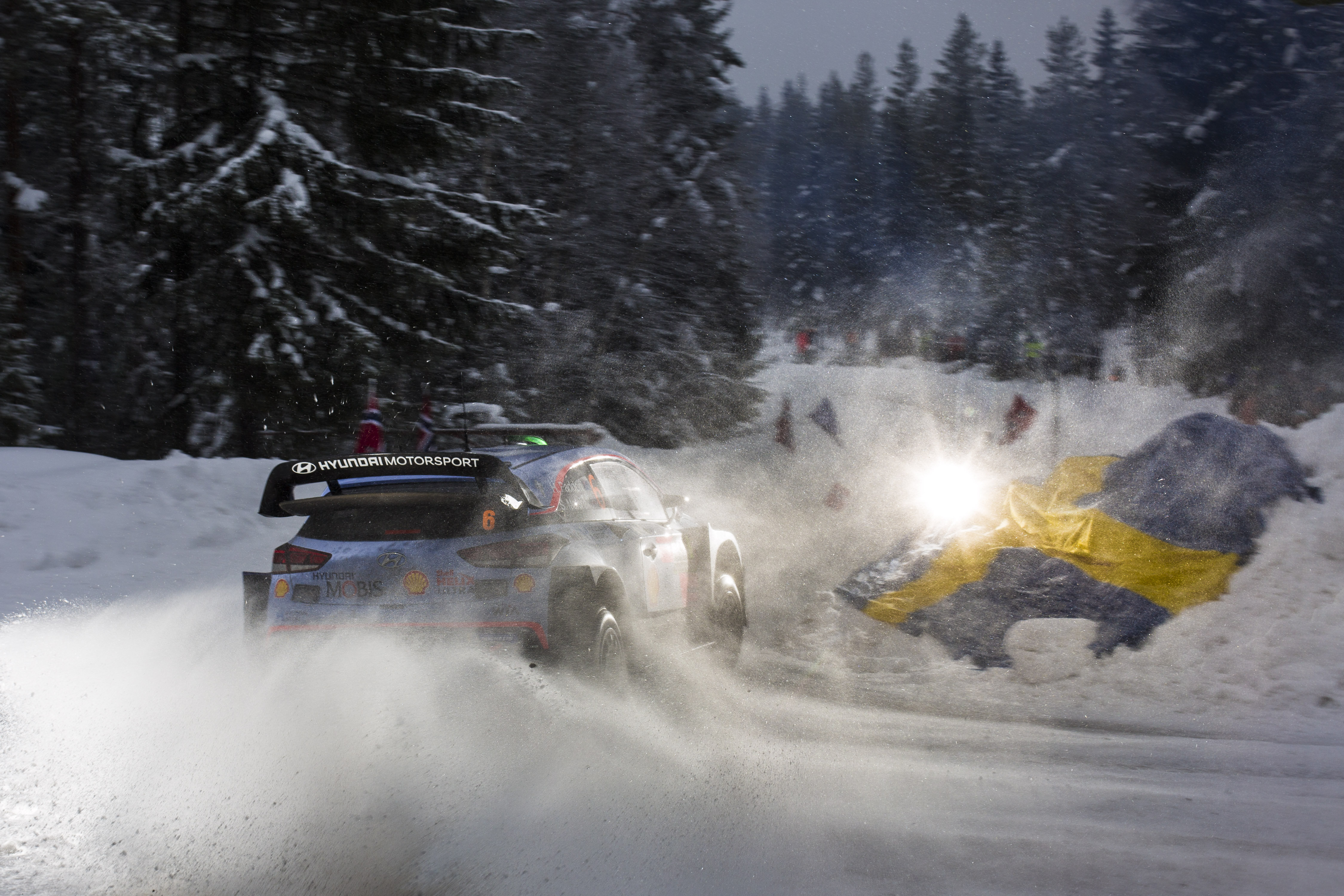 Hayden Paddon i Sebastian Marshall podczas Rajdu Szwecji 2018